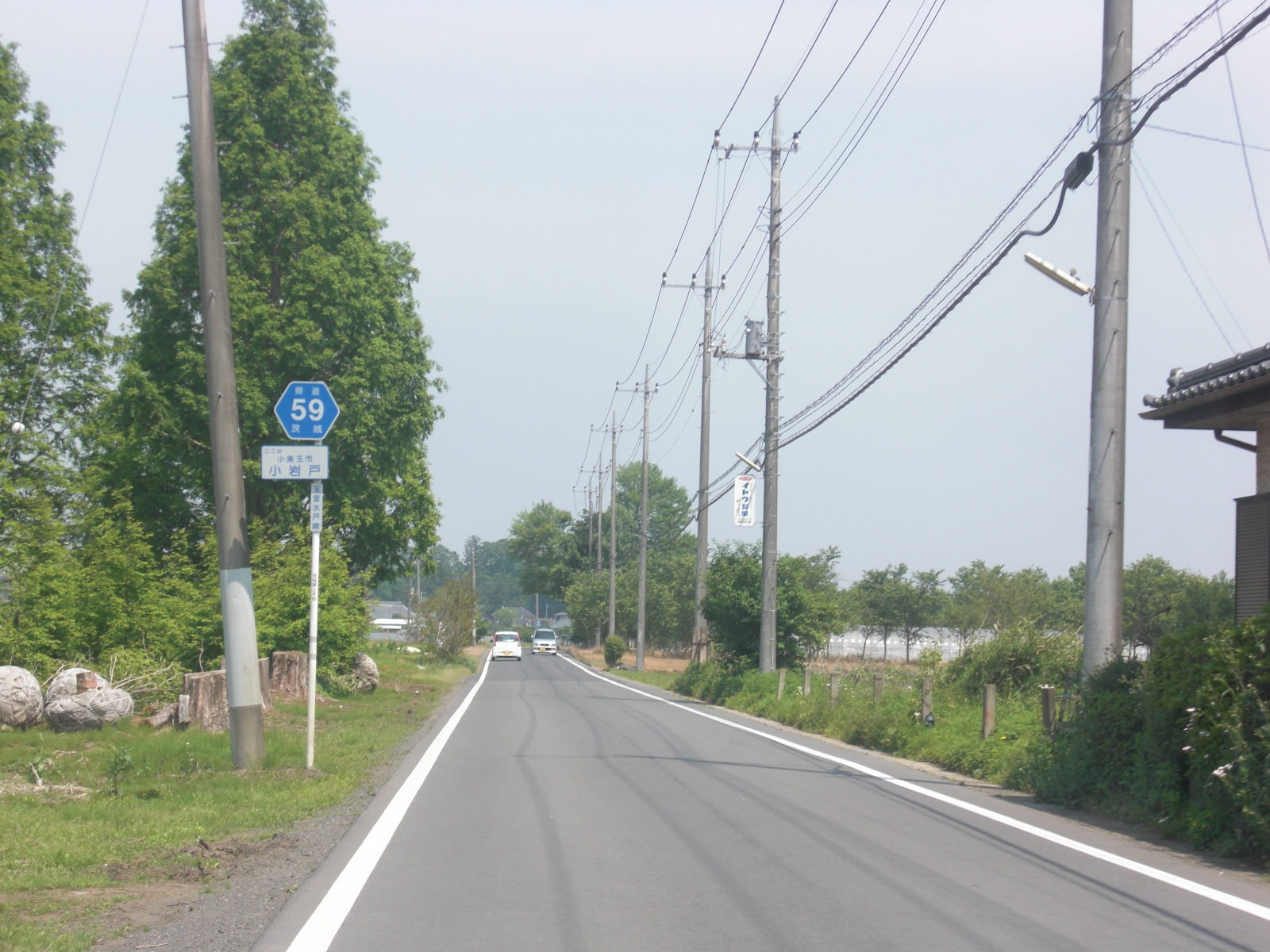 This is a landscape of the Ibaraki prefectural road No. 59 Tamari Mito line in Omitama, Ibaraki, Japan.